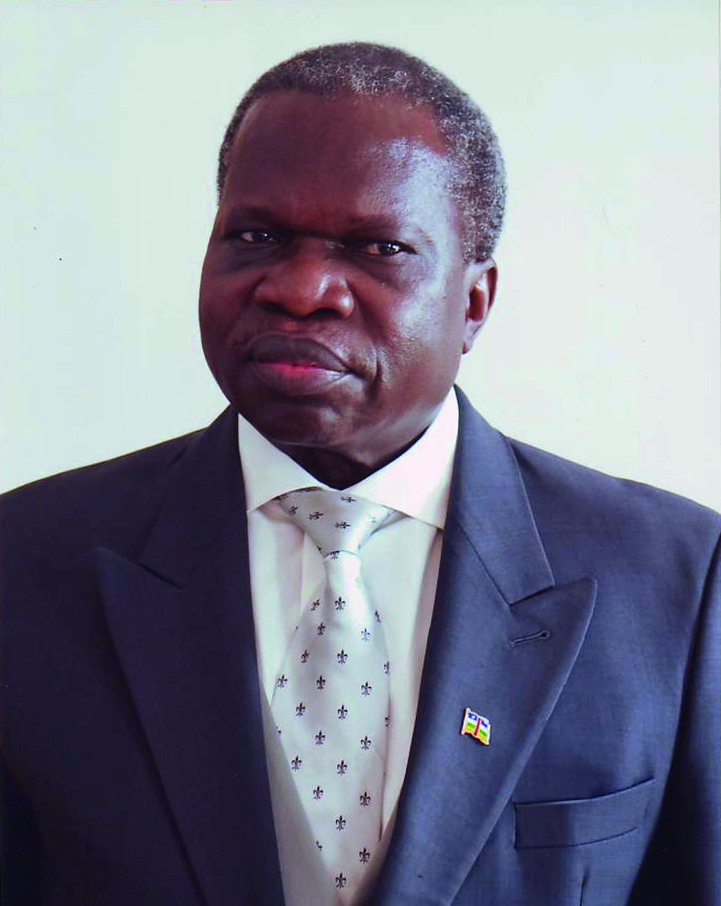 Jean Willybiro-Sako